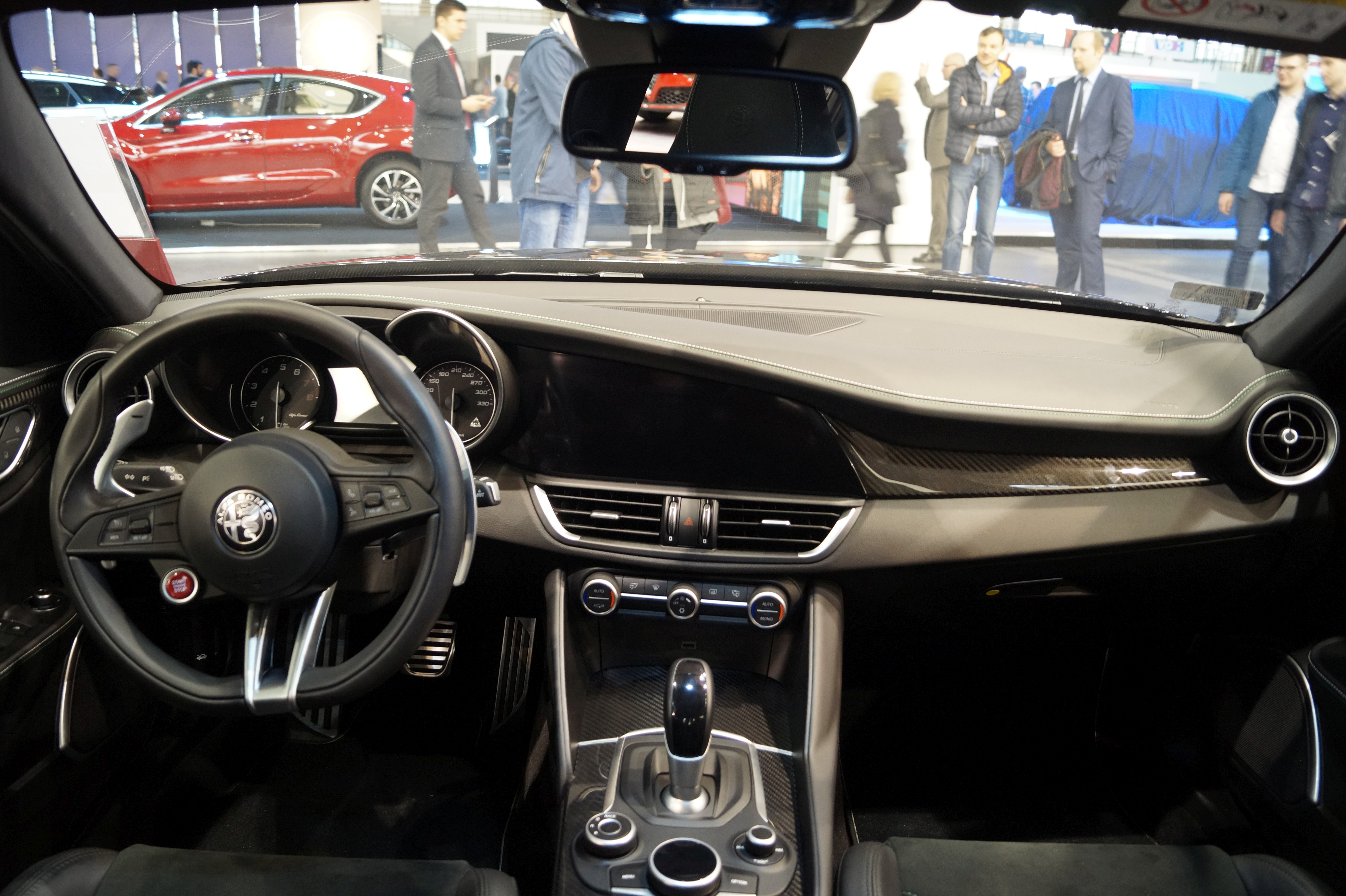 Wnętrze Alfy Romeo Giulia Q4 na Motor Show Poznań 2017.